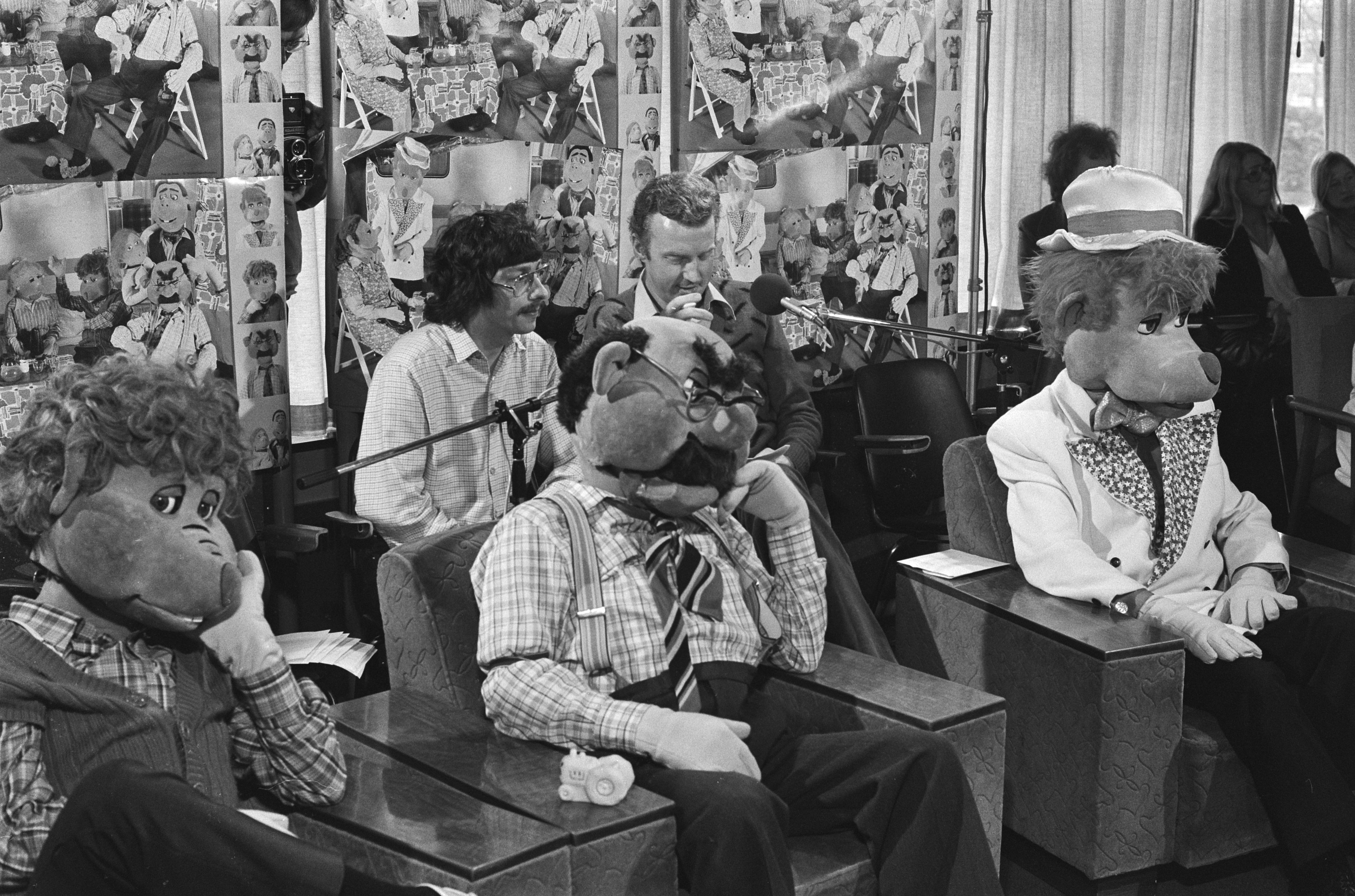 Collectie / Archief : Fotocollectie Anefo Reportage / Serie : "Ome Joop" verkiezingen Beschrijving : Ferry de Groot (links) en André van Duin met op voorgrond v.l.n.r. Meneer de Groot, Ome Joop en Dik Voormekaar Datum : 24 maart 1979 Trefwoorden : juryleden, verkiezingen Persoonsnaam : Duin, André van, Groot, Ferry de Fotograaf : Croes, Rob C. / Anefo Auteursrechthebbende : Nationaal Archief Materiaalsoort : Negatief (zwart/wit) Nummer archiefinventaris : bekijk toegang 2.24.01.05 Bestanddeelnummer : 930-1846